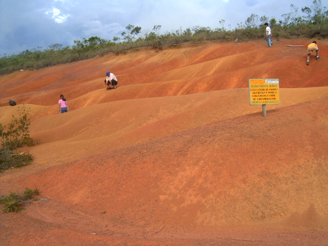 Tierra de Colores, Betulia, Santander, Colombia. Imagen tomada en junio de 2004. No viola ninguna política de copyright Licencia